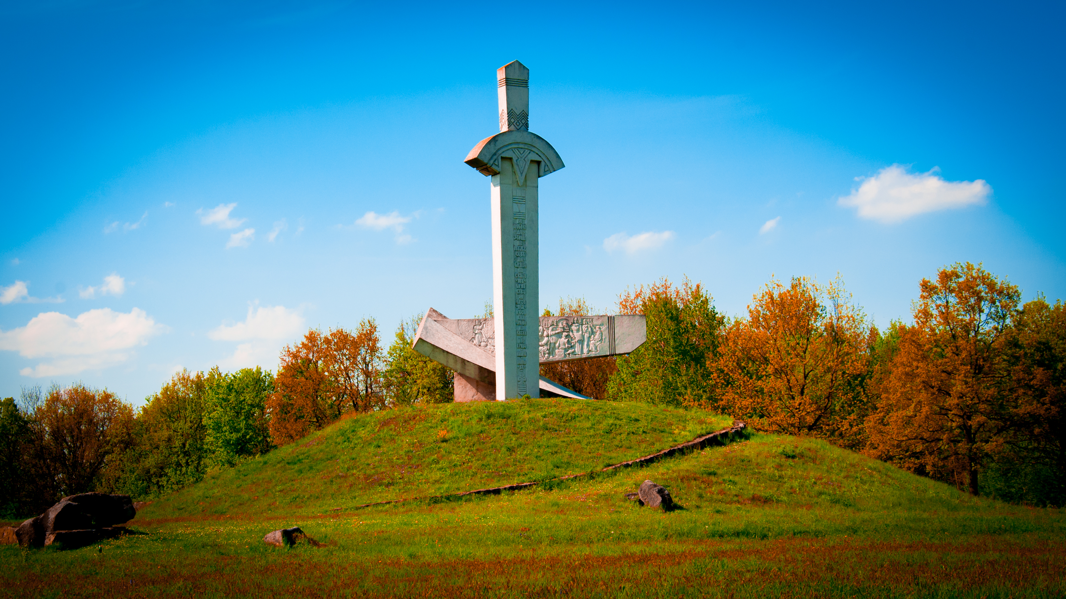 Монумент «Меч і Рало» знаходится навпроти Музею народної архітектури і побуту Прикарпаття, Крилос.